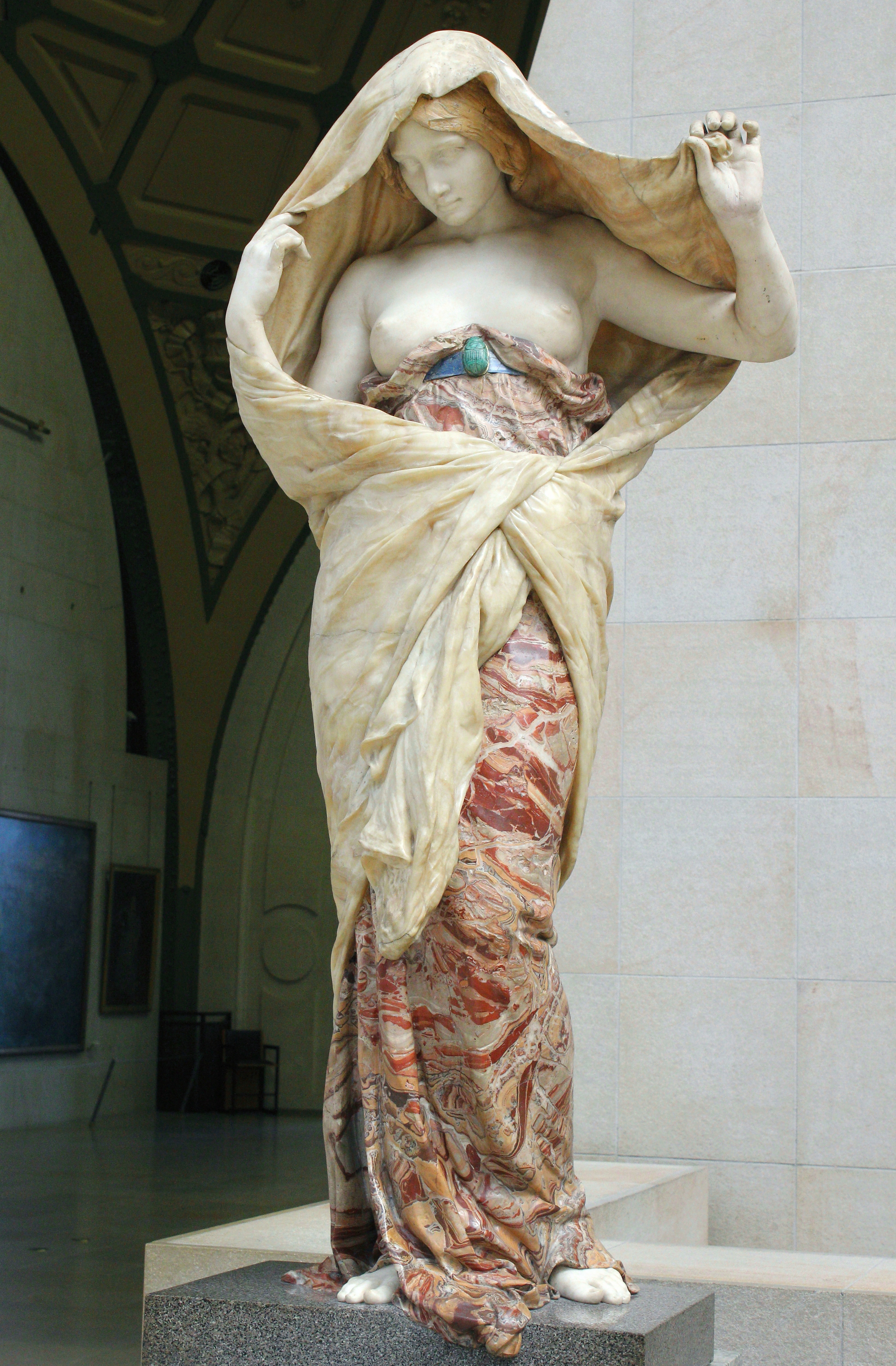 La Nature se dévoilant à la Science (1899). Auteur : Ernest Barrias (1841-1909). Musée d'Orsay, Paris